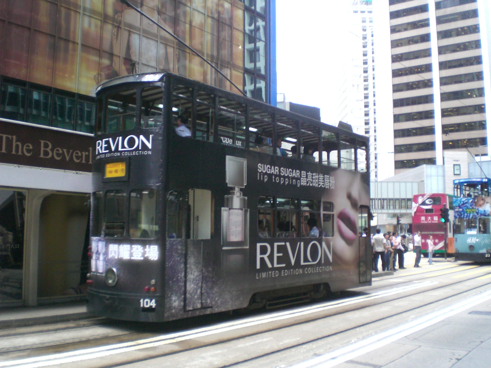 披上REVLON車身廣告的香港電車 Author= RoxRox